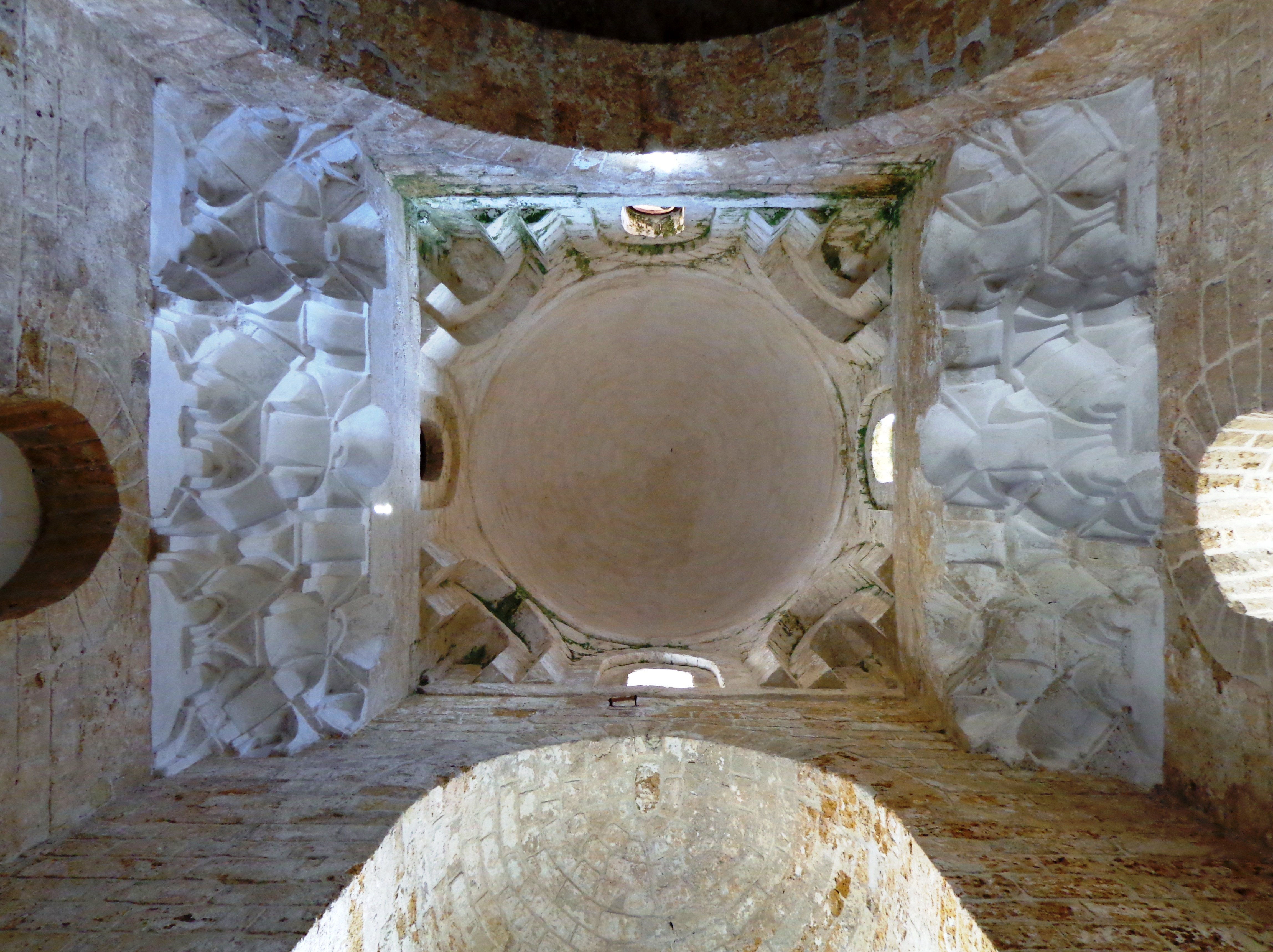 Palazzo Zisa PA 10